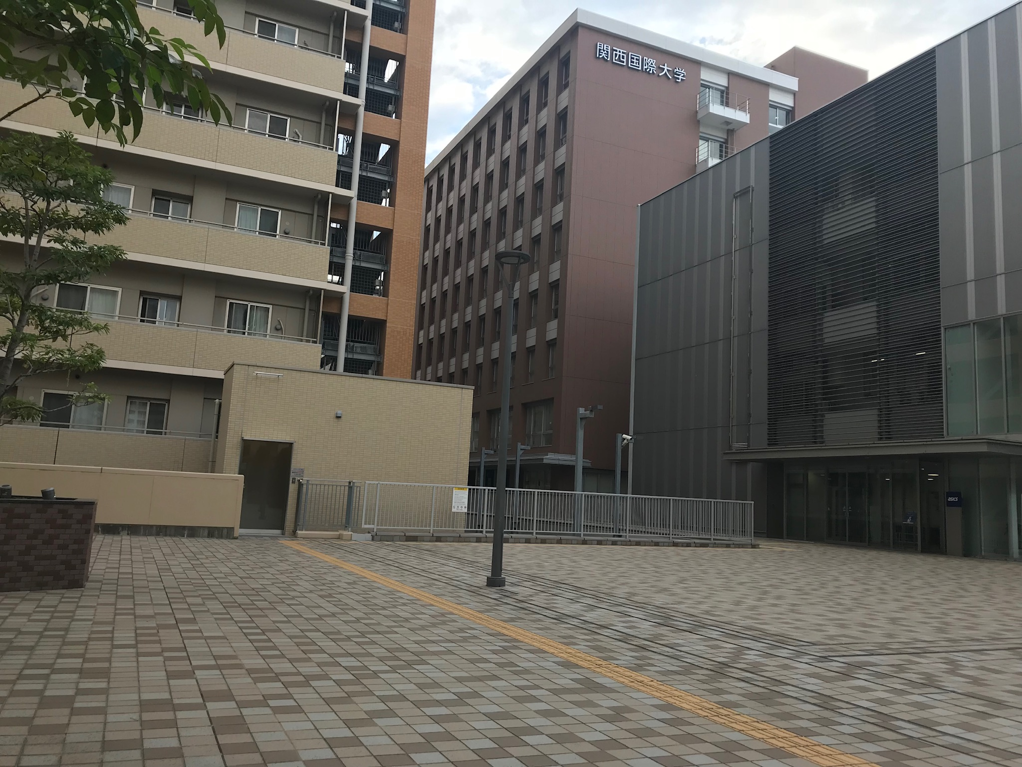 関西国際大学尼崎キャンパスを3階デッキからみた風景（建物東側）、手前はアシックスジャパン 関西オフィス